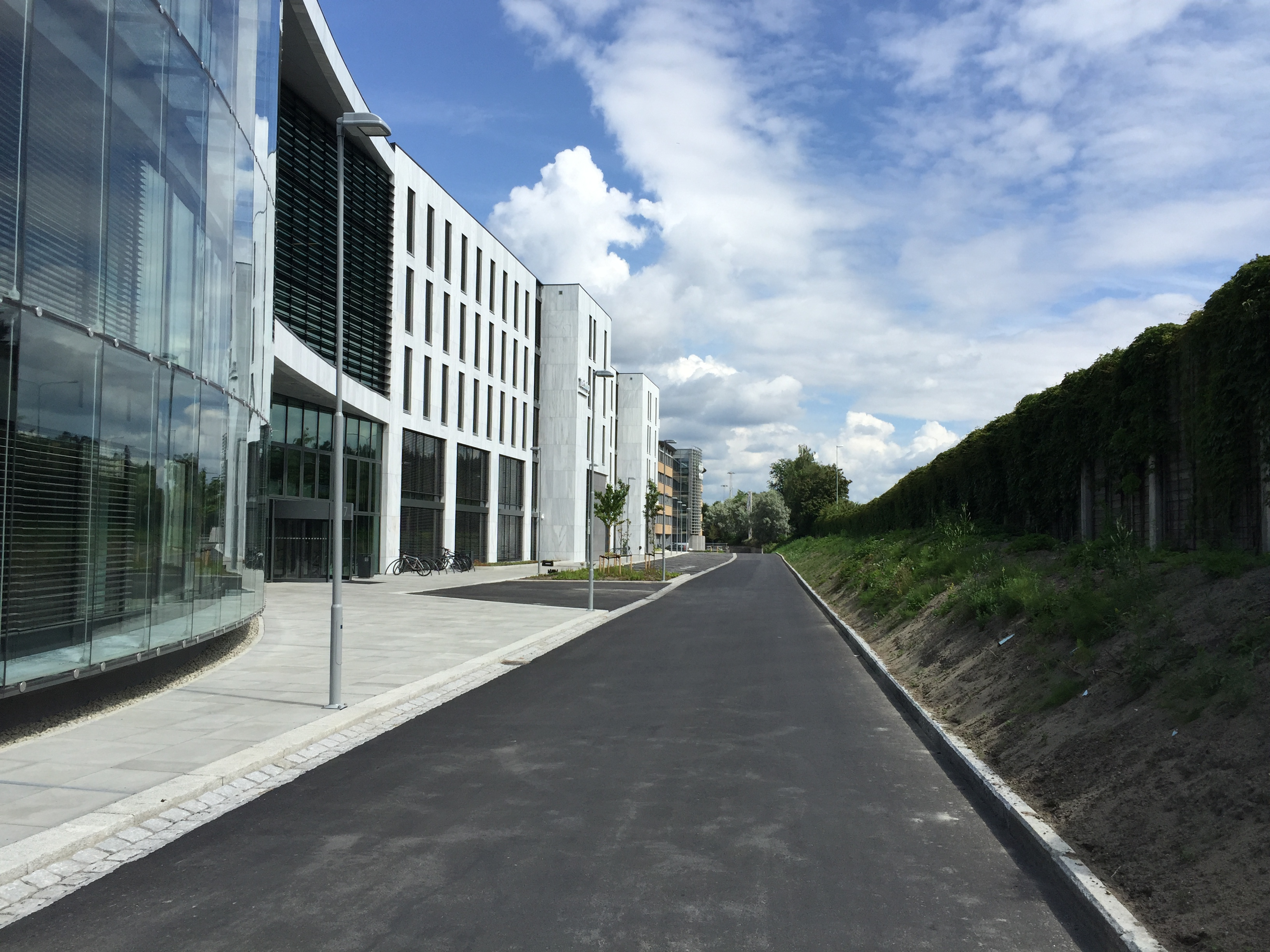 Philip Pedersens vei i Bærum.